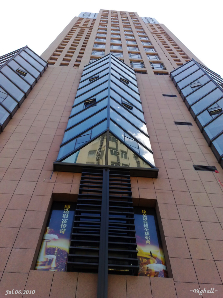 天邑国际-By Bigball